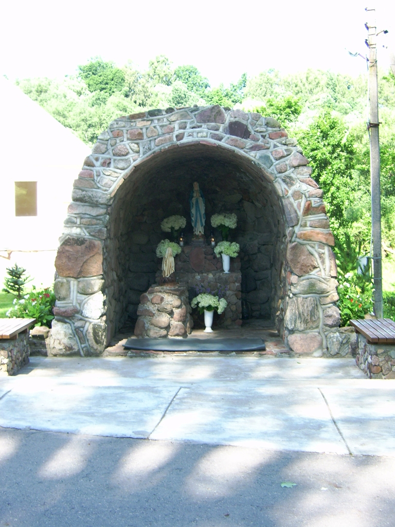 Lurdo koplyčia Pajūryje